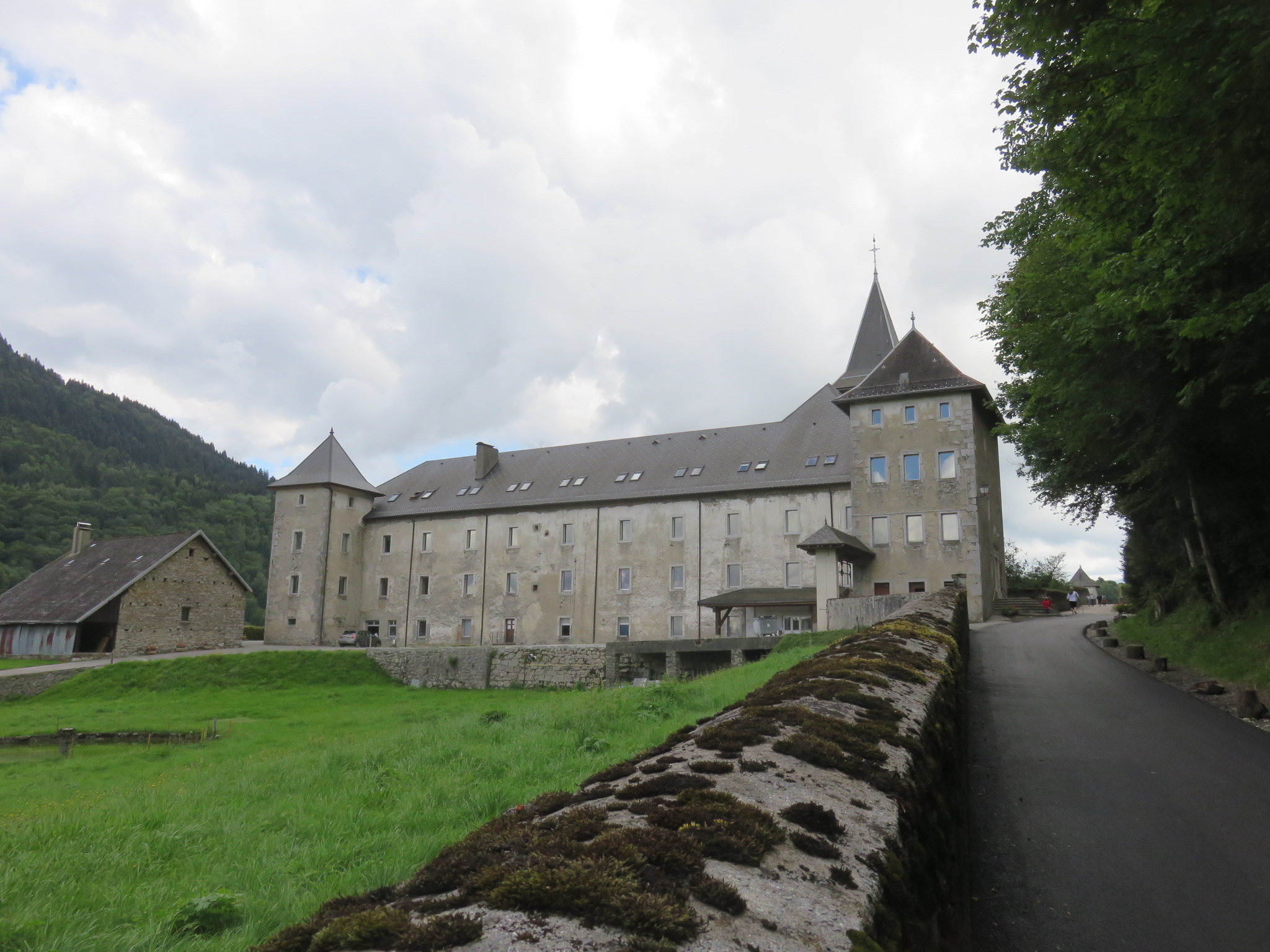 Abbey of Tamié